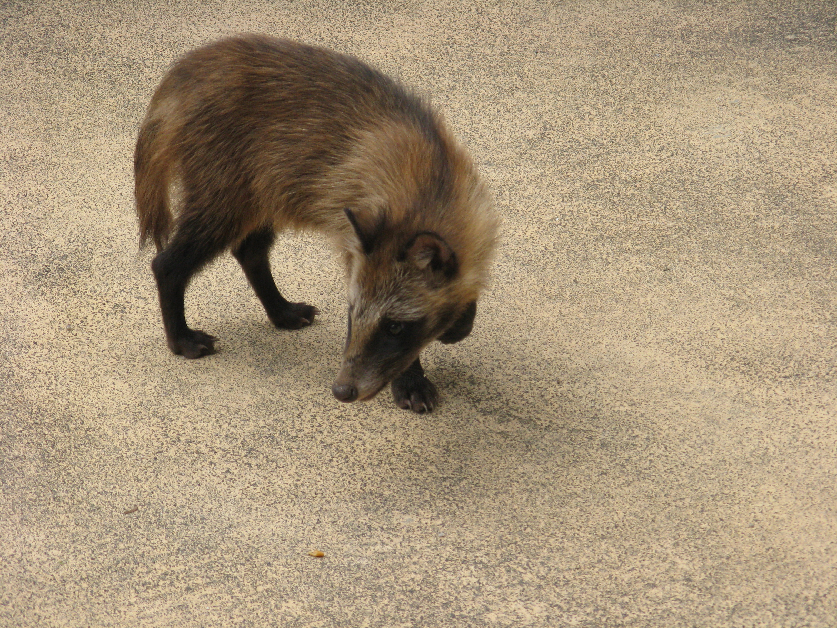 Nyctereutes procyonoides, juvenile, taken in Miyajima, Japan